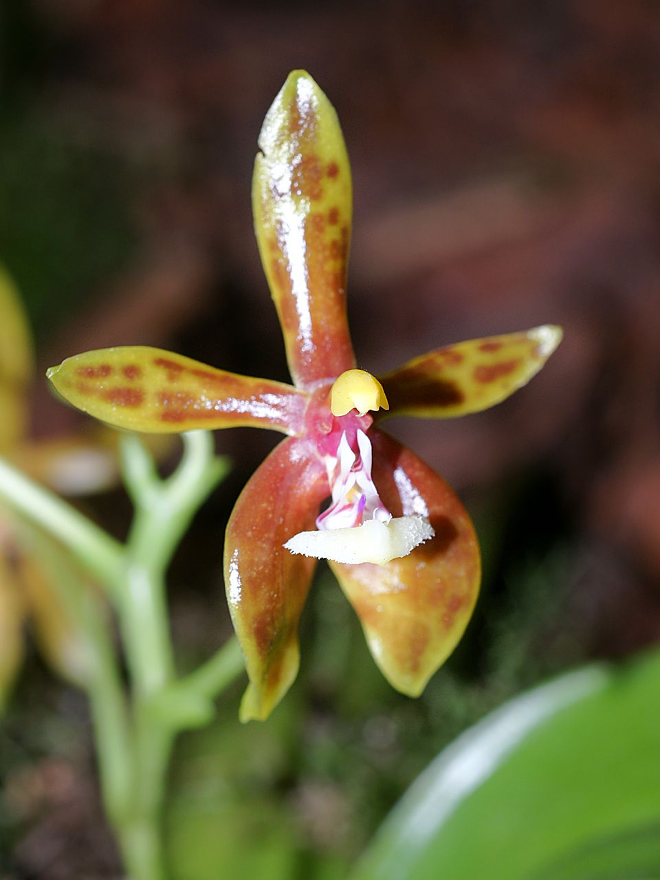 Phalaenopsis mannii